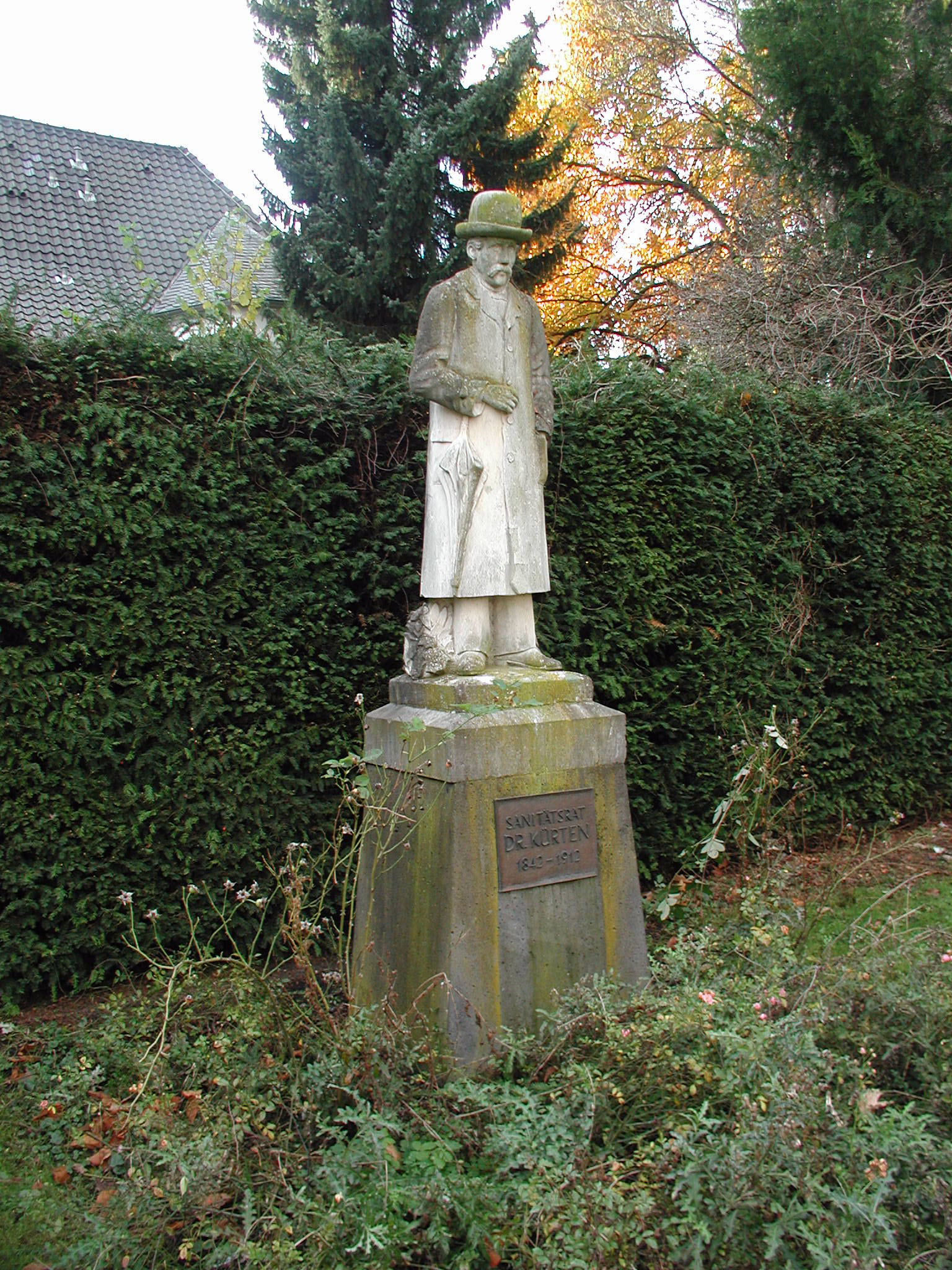 Hürth-Alt-Huerth, Dr. Kürten, Ehrenbürger